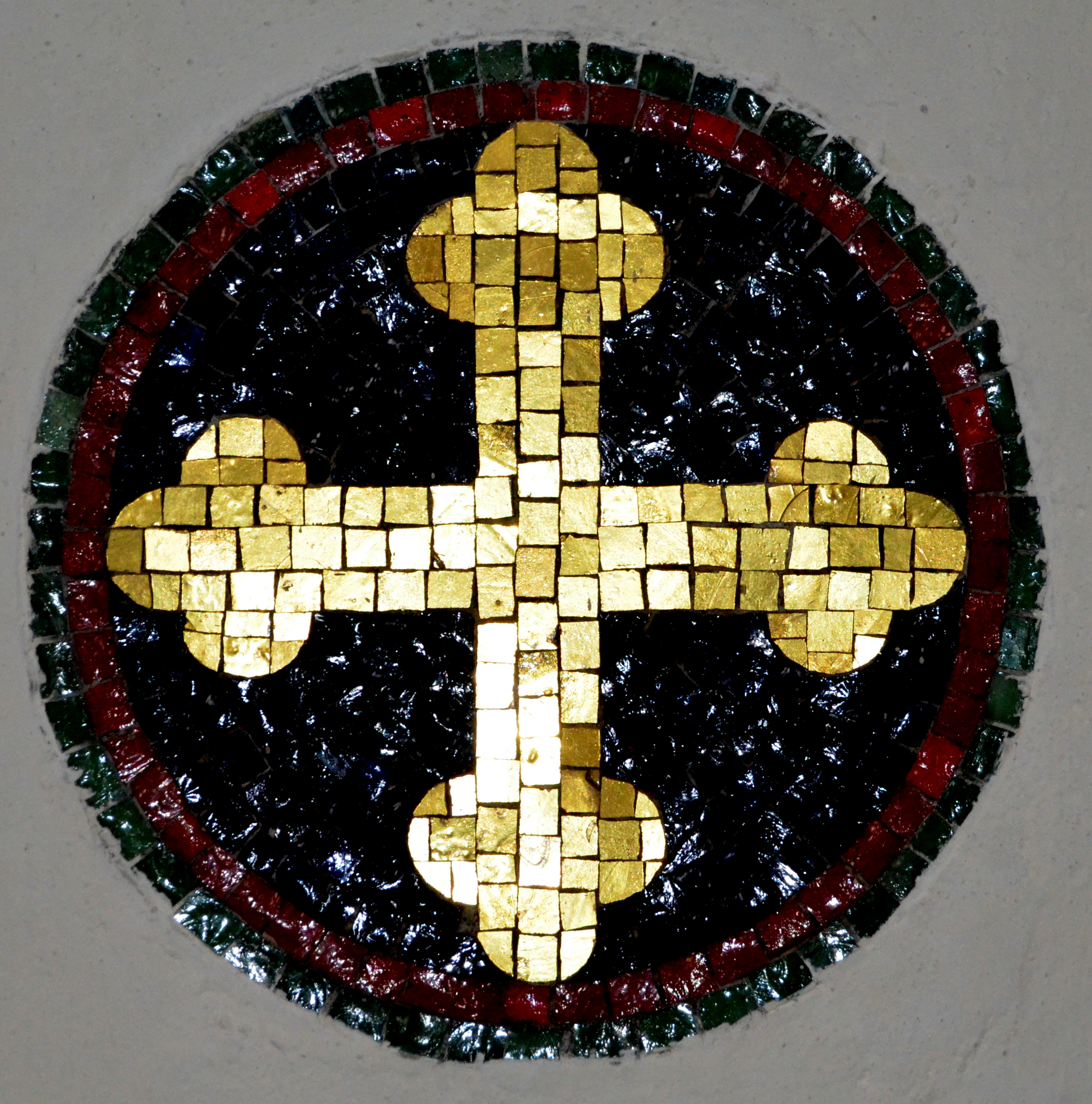 Wijdingskruis